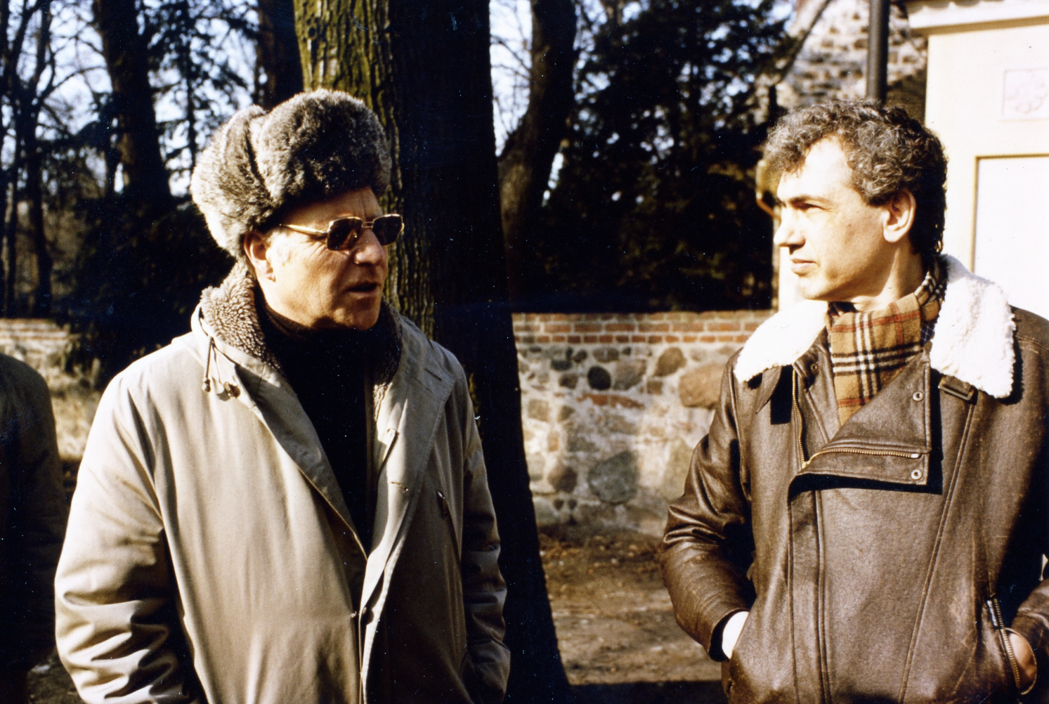 Ulrich Waack (rechts) 1983 mit dem damaligen Landesarchäologen Prof. Adriaan von Müller vor der Dorfkirche Britz